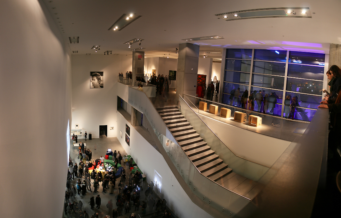 Muzej suvremene umjetnosti u Zagrebu